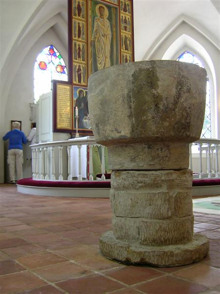 Photo: Bengt Olof ÅRADSSON Frillestads kyrka, dopfunt